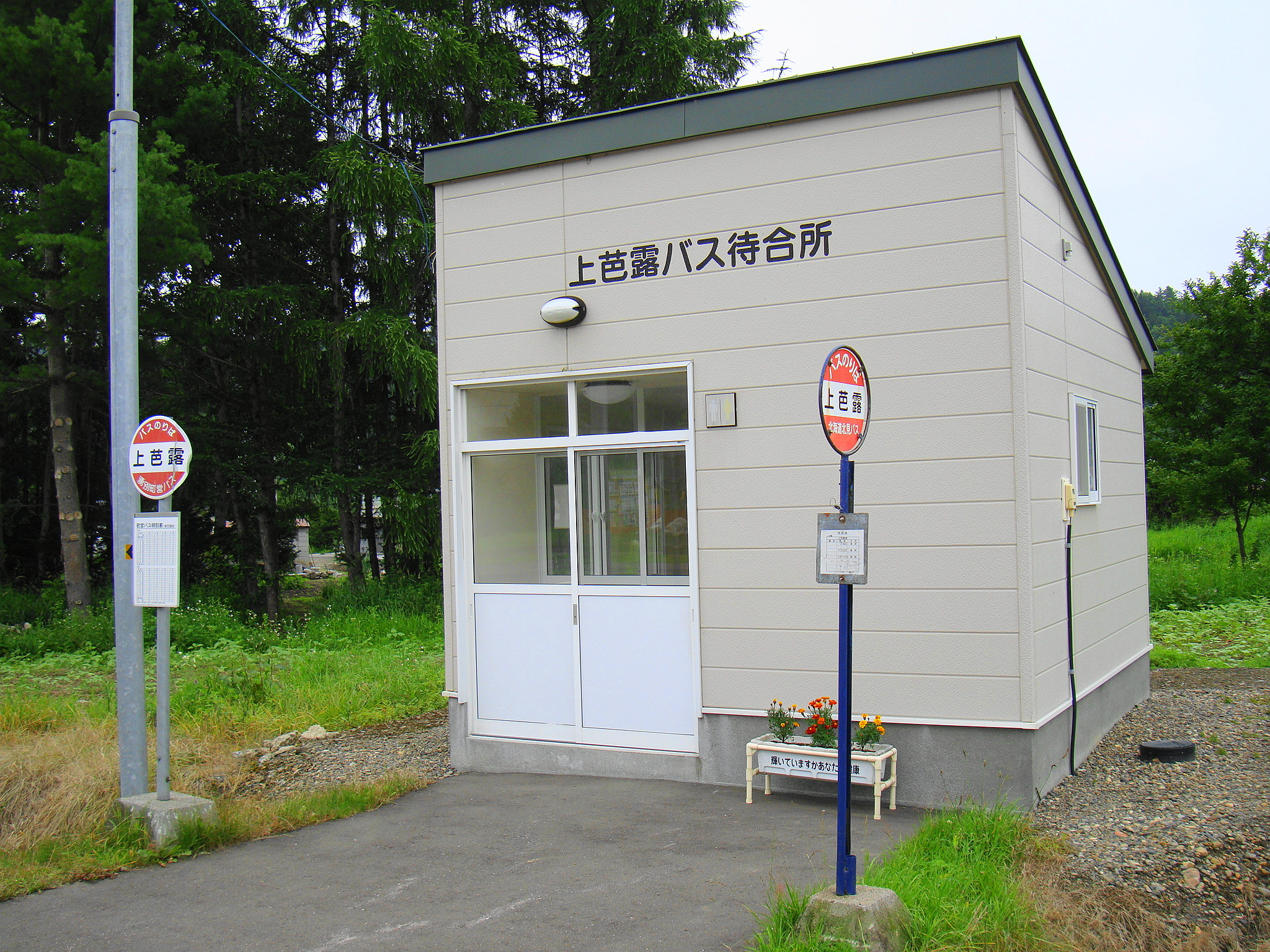 "Kami-Barō" Bus stop